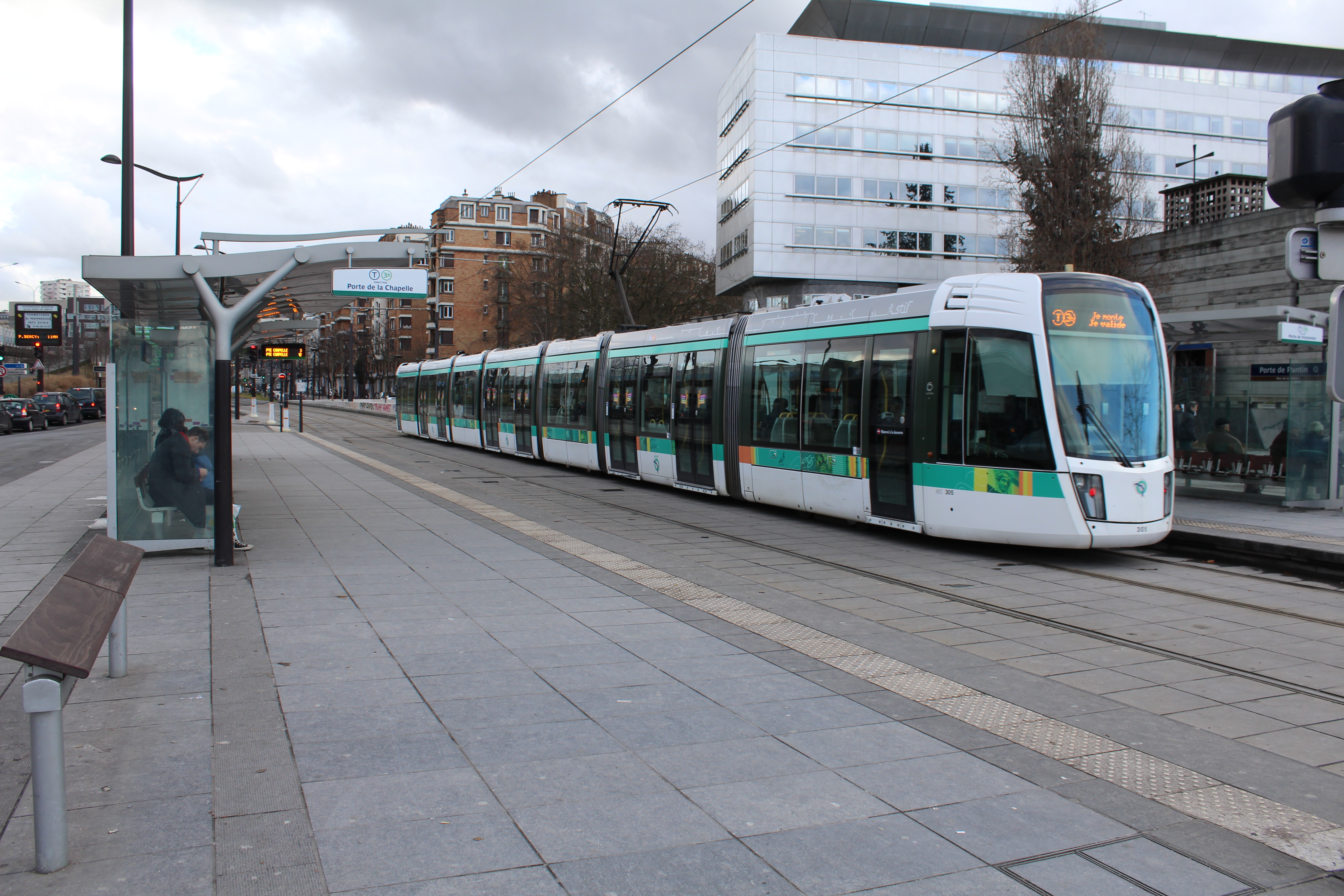 Station de tramway Porte de Pantin sur la ligne 3b du tramway d'Île-de-France.